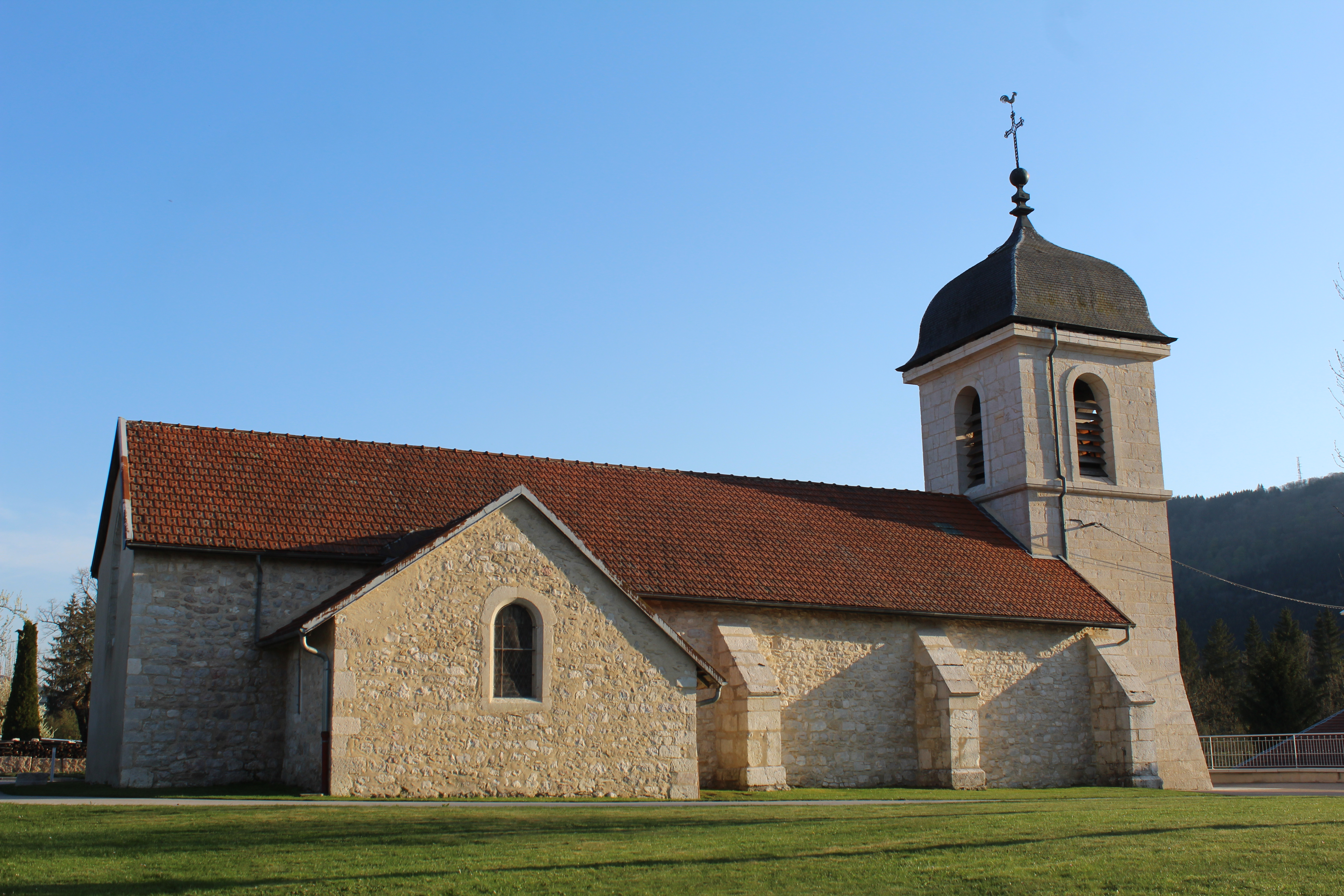 Église Saint-Jean-Baptiste de Vieu-d'Izenave.